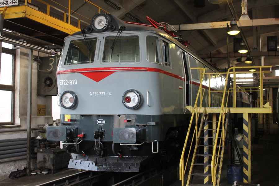 Elektrowóz ET22-910, prezentujący nowe szaro-czerwone barwy PKP Cargo, stoi w jednej z hal na terenie Zakładu Centralnego spółki w Warszawie.